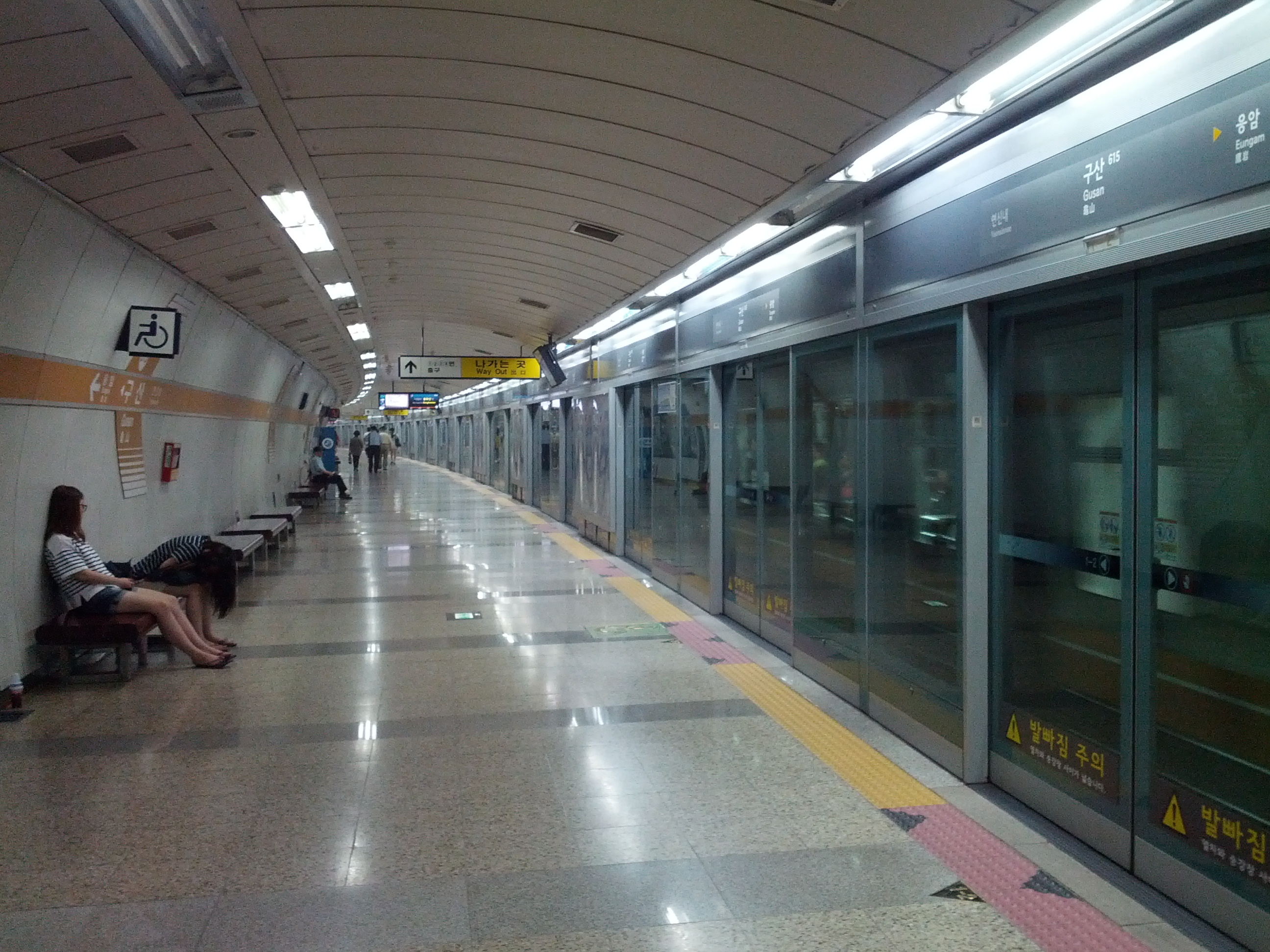 구산역 승강장